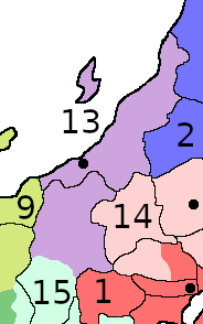 数字は師管の番号。黒丸は師団司令部の所在地。中央の藤色の部分が第13師管である。